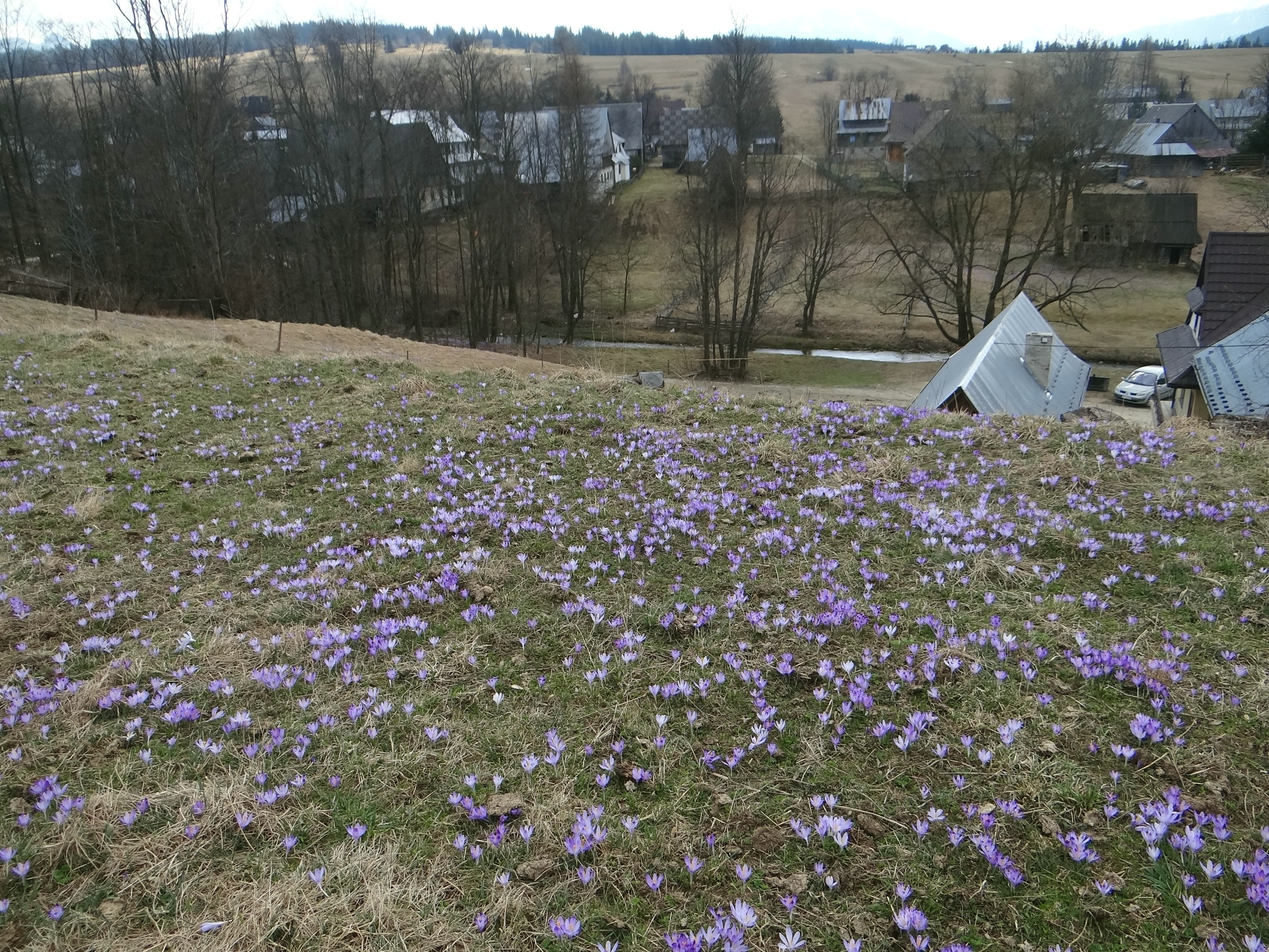 Dzianisz. Krokusy w dolinie Dzianiskiego Potoku